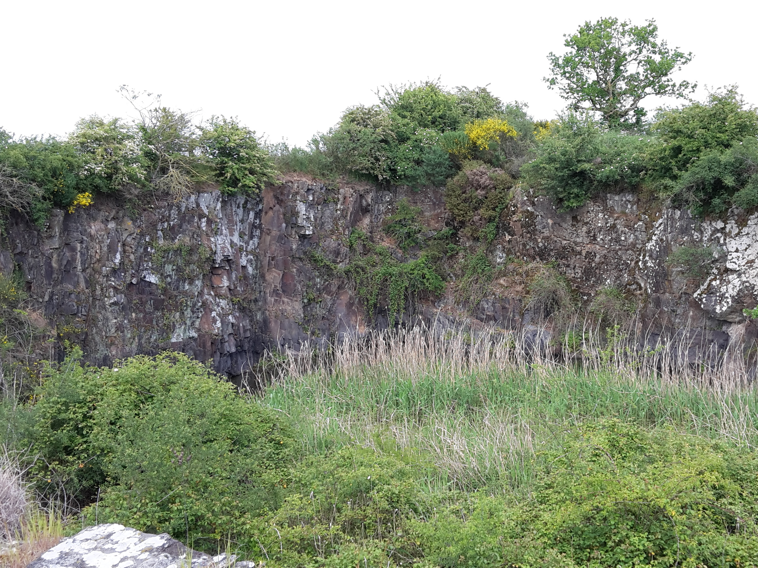 Carrière de schiste de la Mointière, Le Pin, Loire-Atlantique, France.